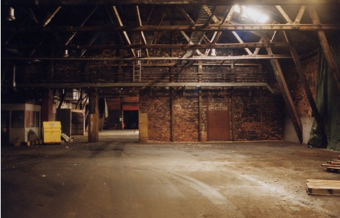 Insidan av en del av den gamla fabriken i Ljungaverk. Fotograf är användare:pastorn under ett besök på fabriken under år 2001